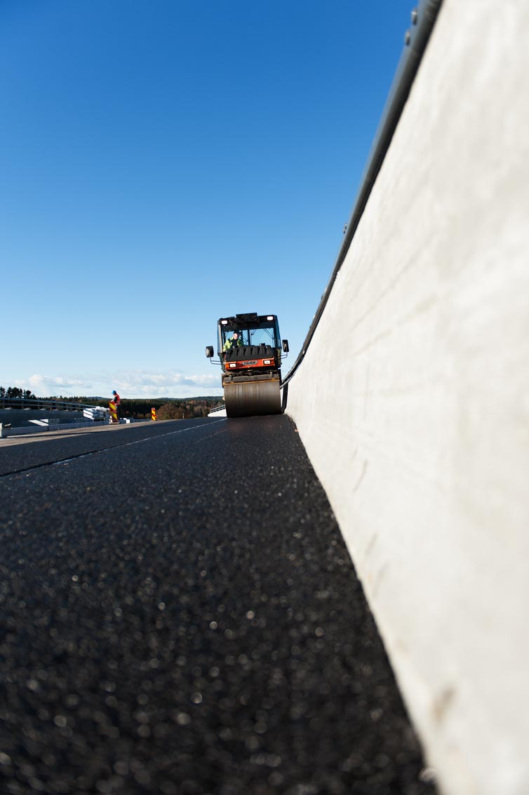 Lemminkäinen Norge AS produserer asfalt på 25 asfaltfabrikker plassert rundt i hele Norge for alle kjente anvendelsesområder av produktet